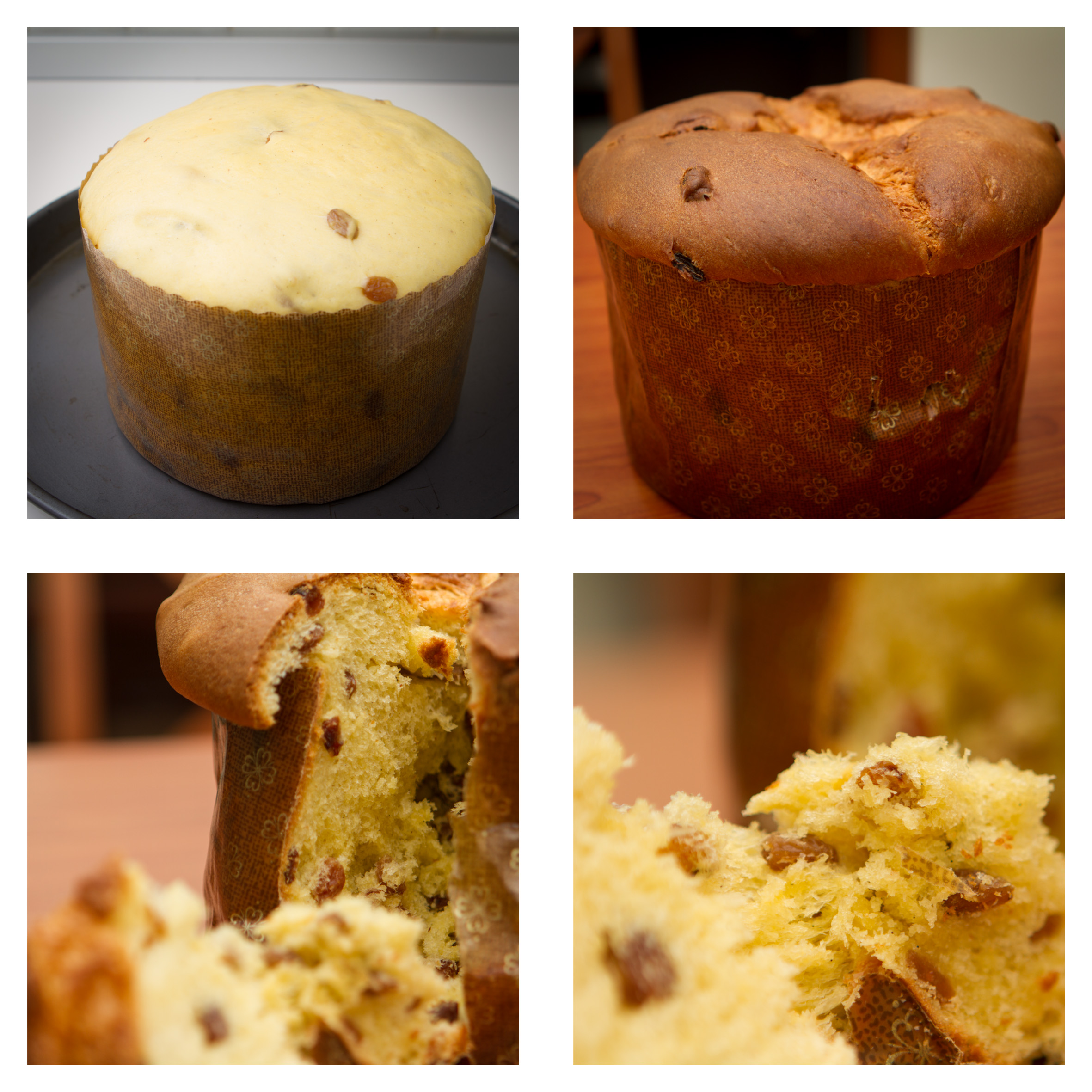 Panettone (pronounced /ˌpænəˈtoʊni/